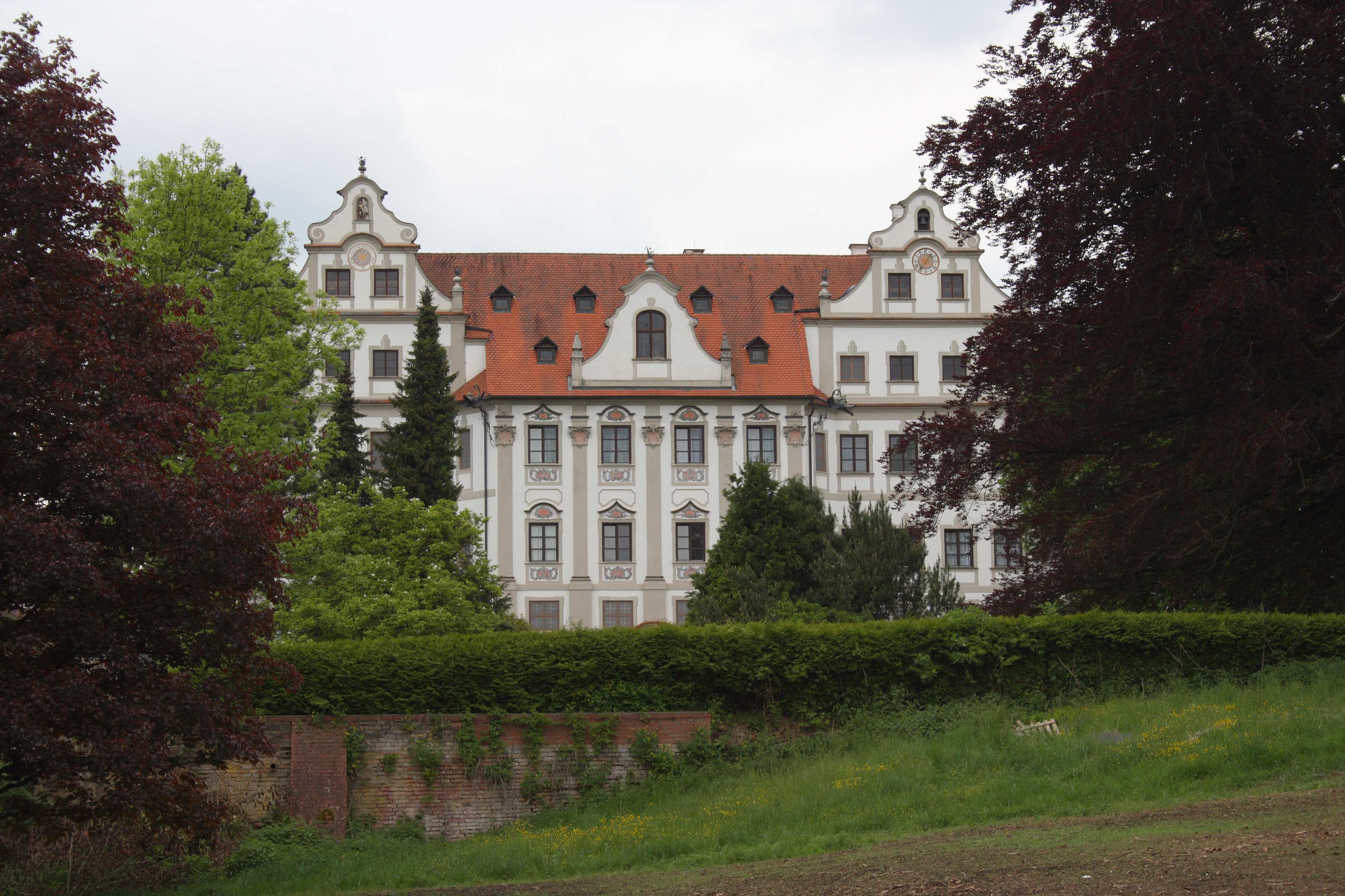 Schloss in Harthausen, einem Ortsteil von Rettenbach im Landkreis Günzburg (Bayern)